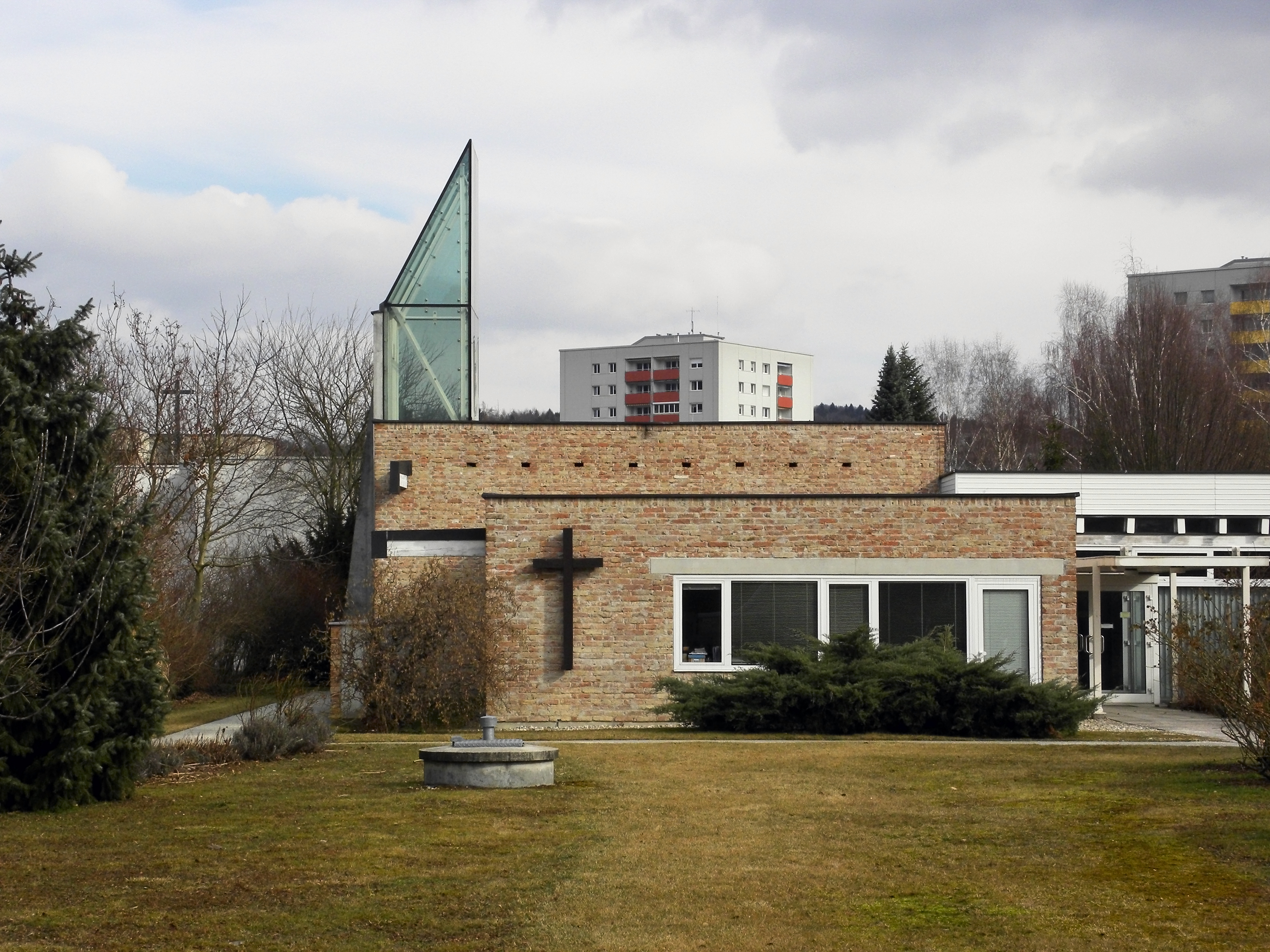 Evang. Pfarrkirche A.B., evangelische Versöhnungskirche